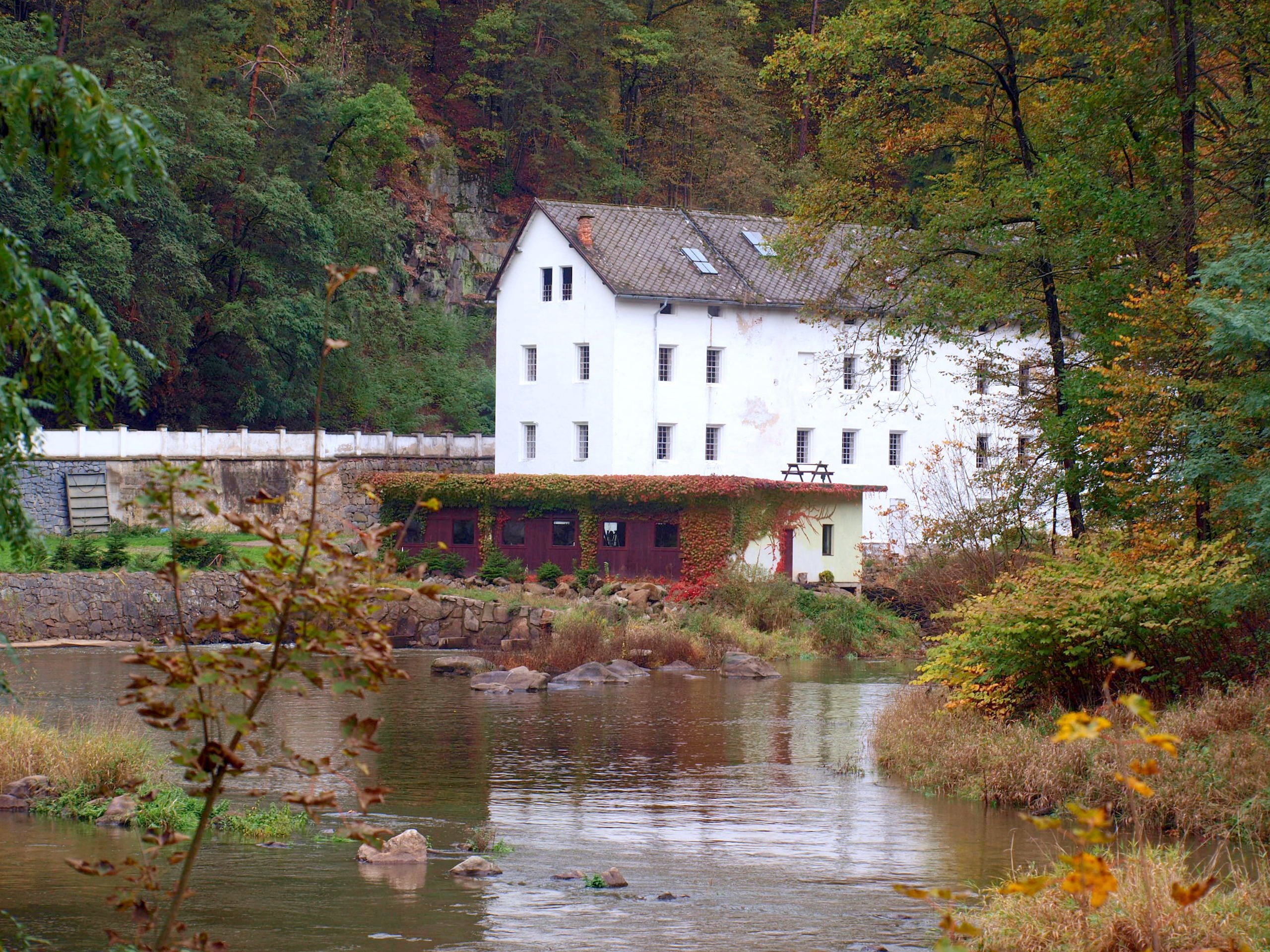 Benešův mlýn na Lužnici na okraji Tábora